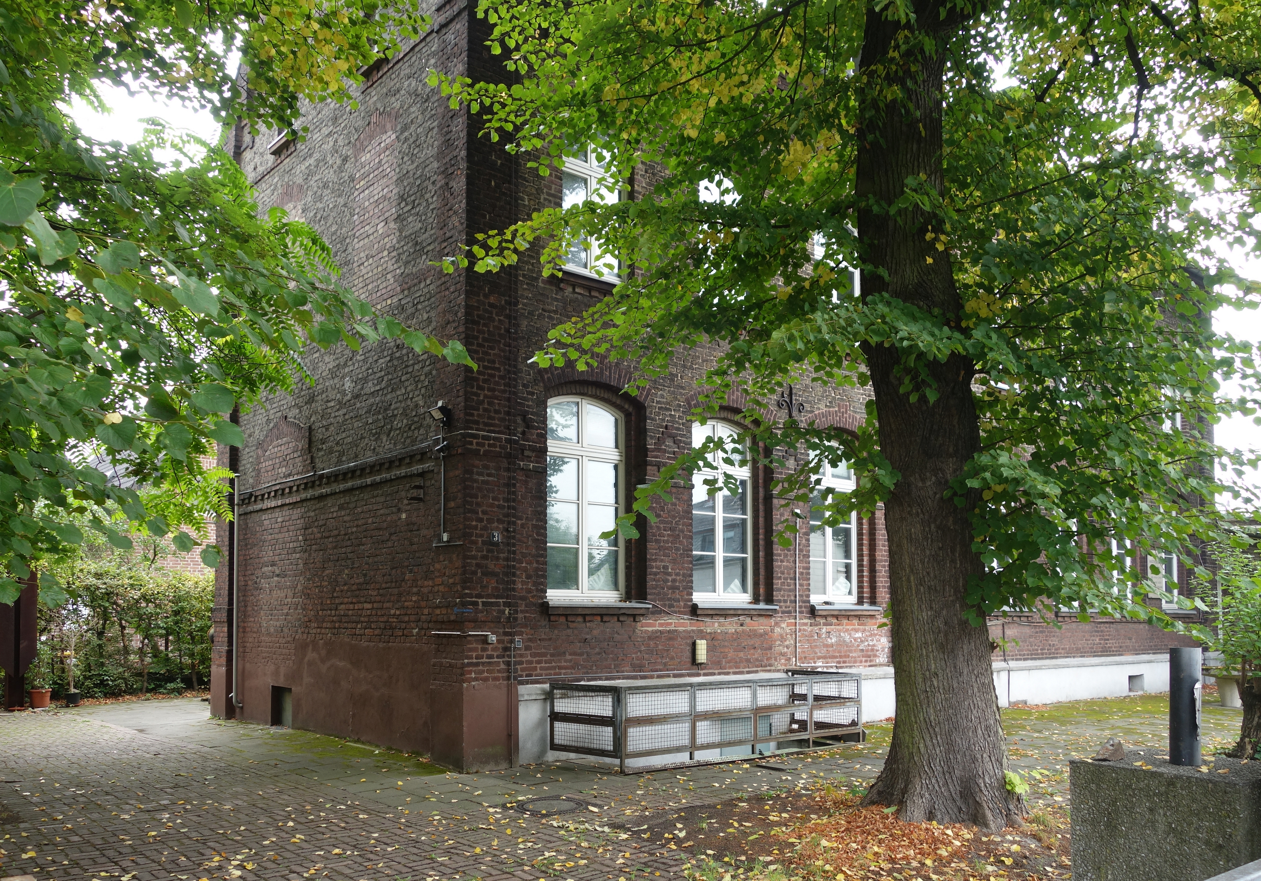 Besuch bei Günter Weseler im Atelierhaus, Düsseldorf Nieder-Lörick, September 2018.